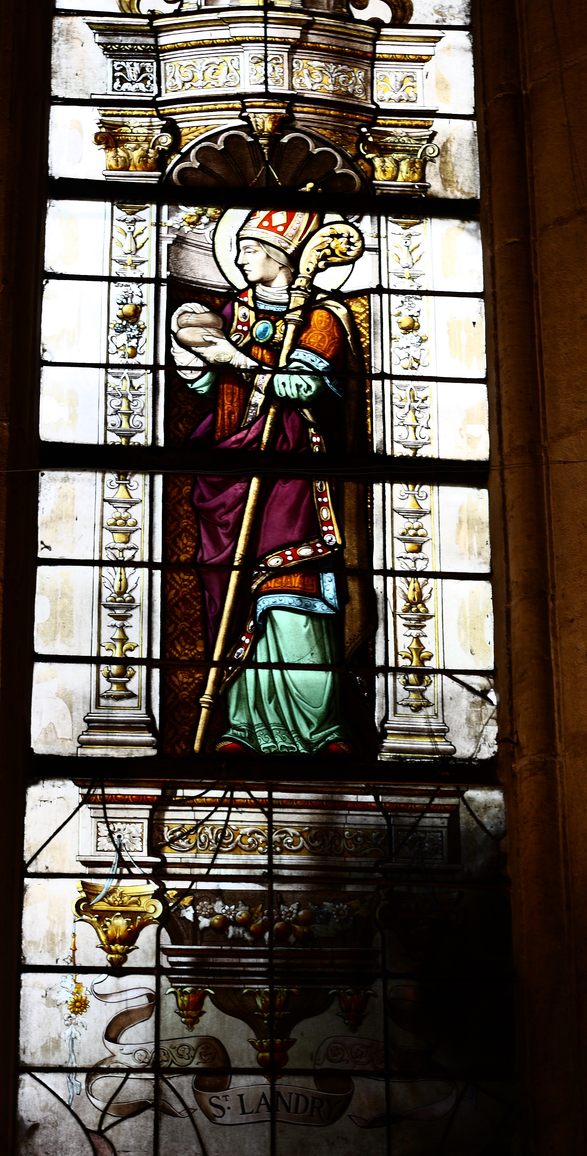 rechter Teil eines Bleiglasfensters (Langhaus) in der katholischen Pfarrkirche St-Médard in Paris. Darstellung: hl. Landry